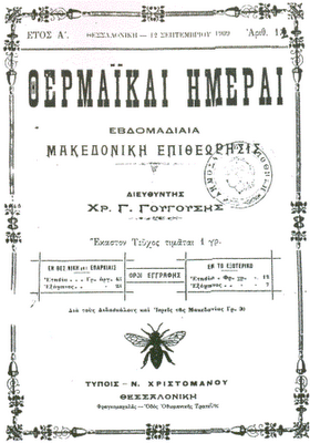 Първа страница на списание "Термайке Имере".